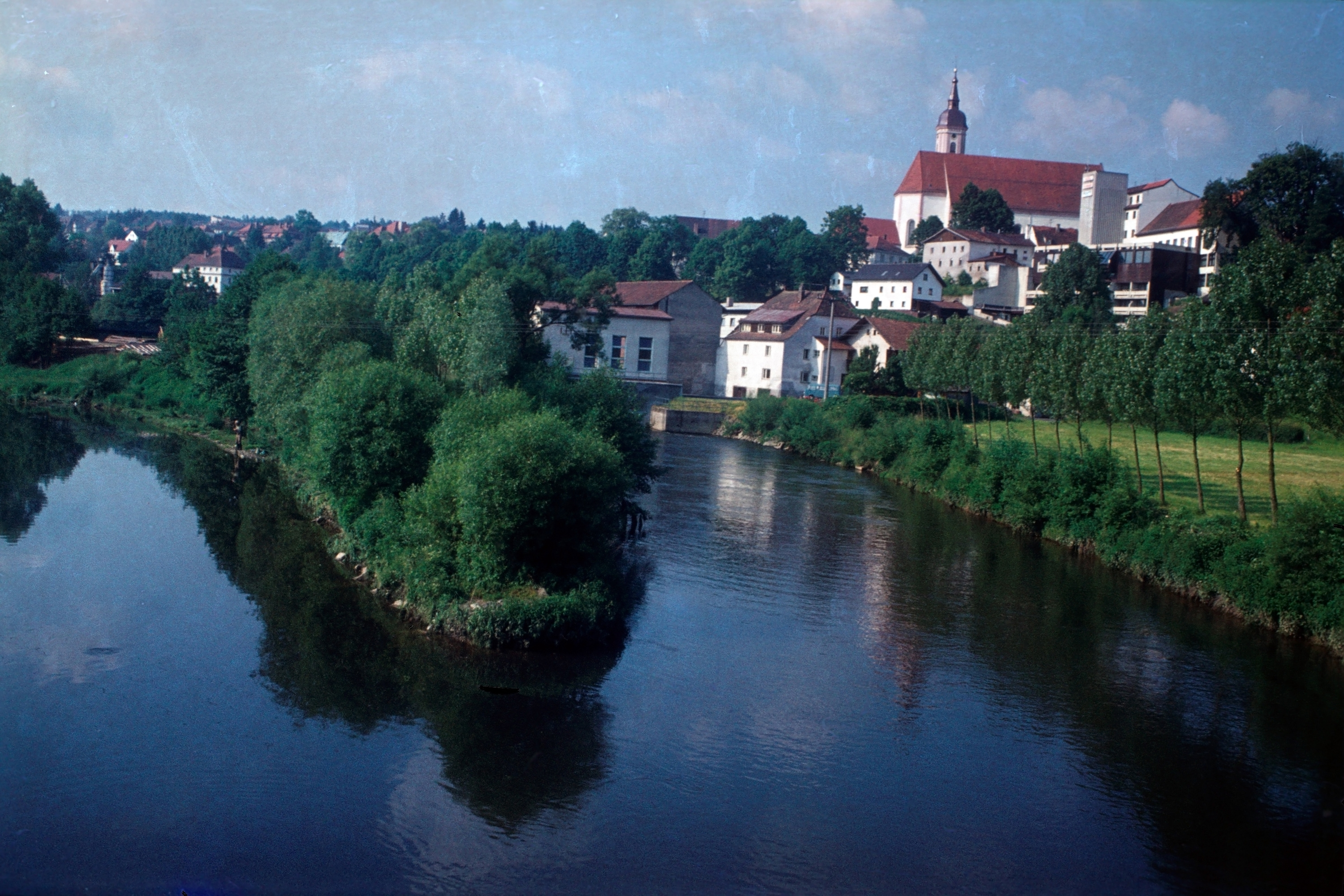 Viechtach und der Regen.